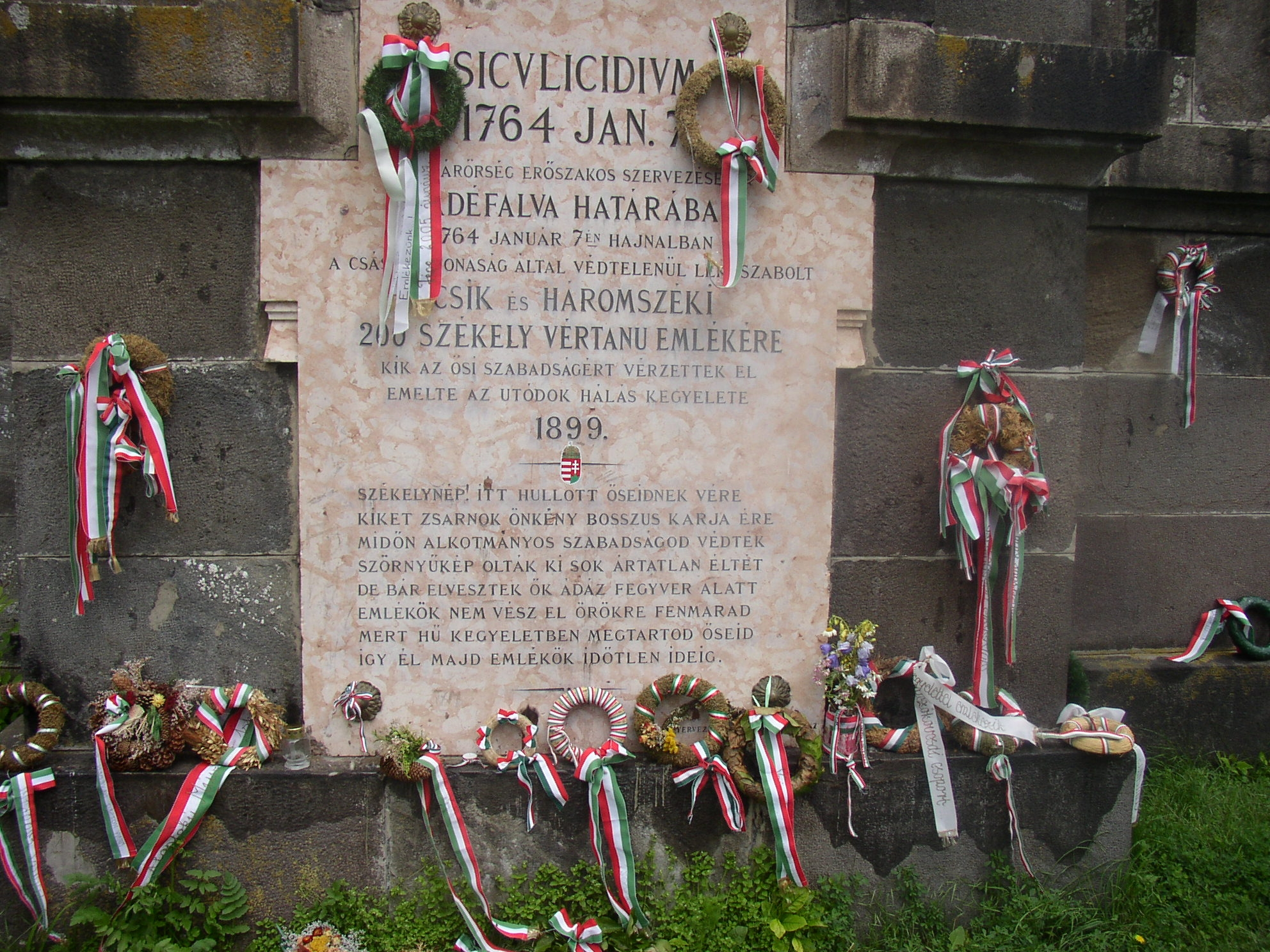 Laslo Varga